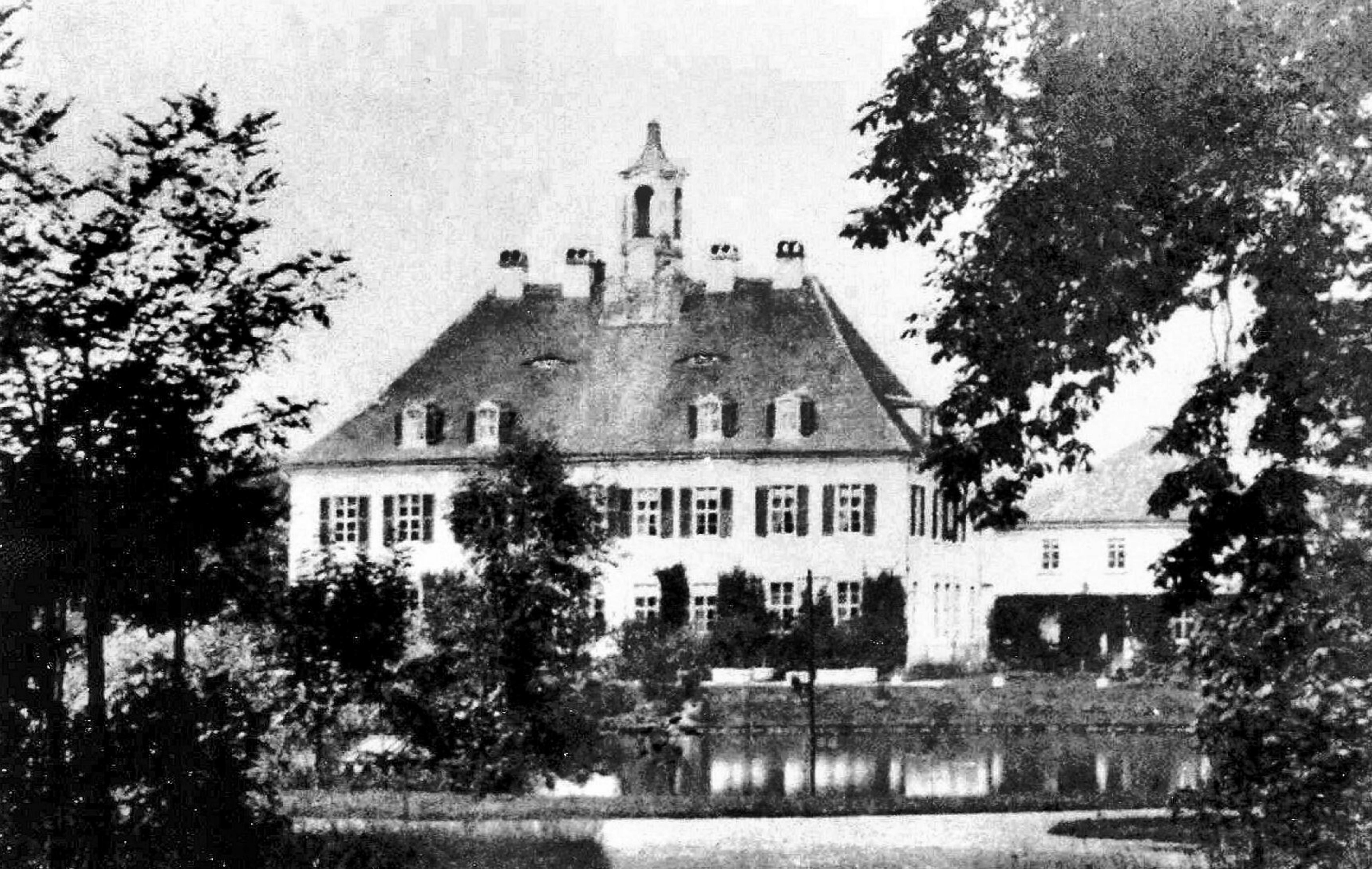 scan: Ansichtskarte von 1905, Schloss Lauterbach im Landkreis Meißen vor 1865